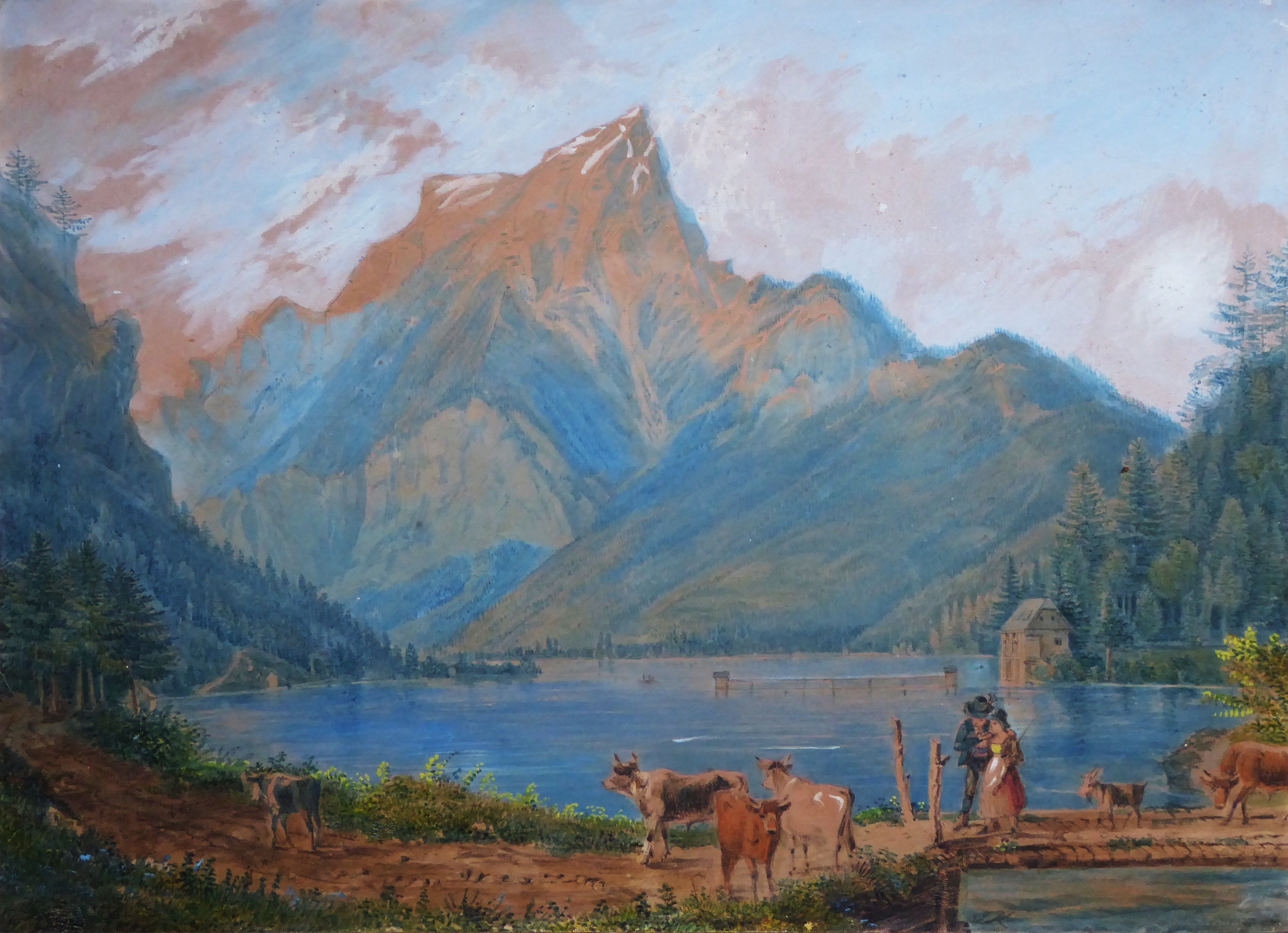 Leopoldsteiner See, Bleistiftzeichnung auf Papier, 19. Jhdt. (19x26 cm), aquarelliert, Original. Signatur "JK".